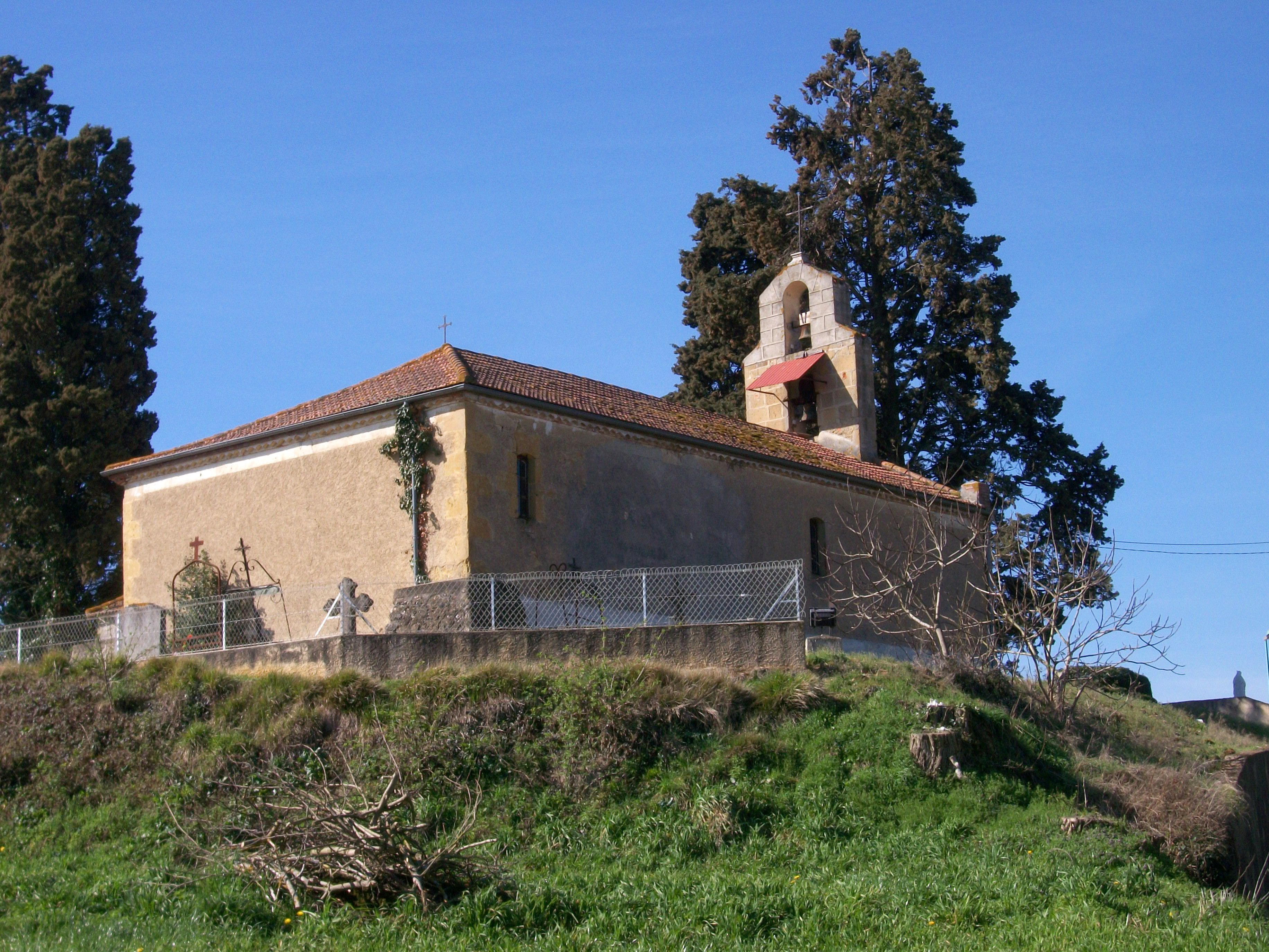 Église de Monpardiac (Gers, France)